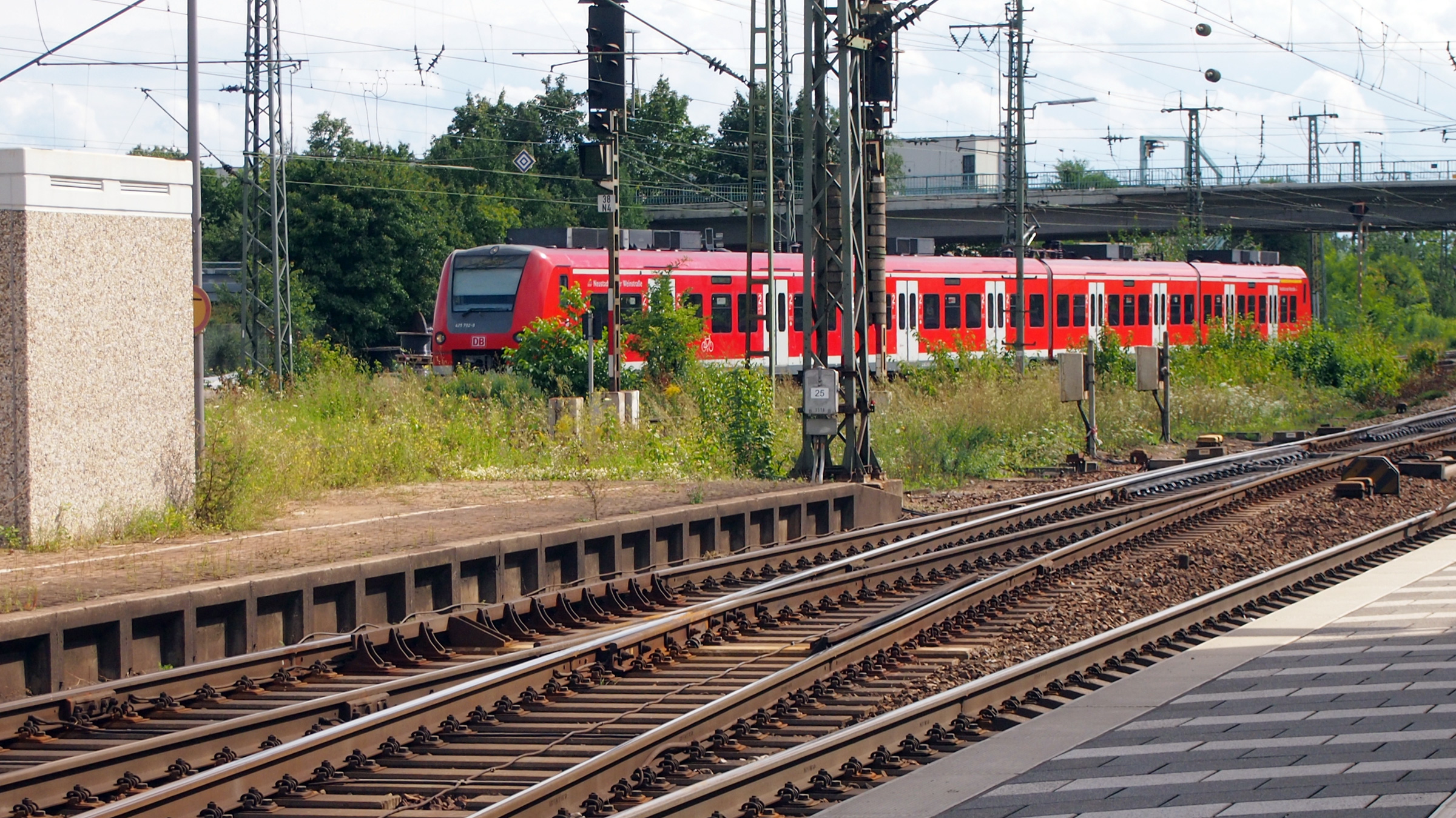 Bahnhof Graben-Neudorf, S-Bahn RheinNeckar, von Bruchsal kommend